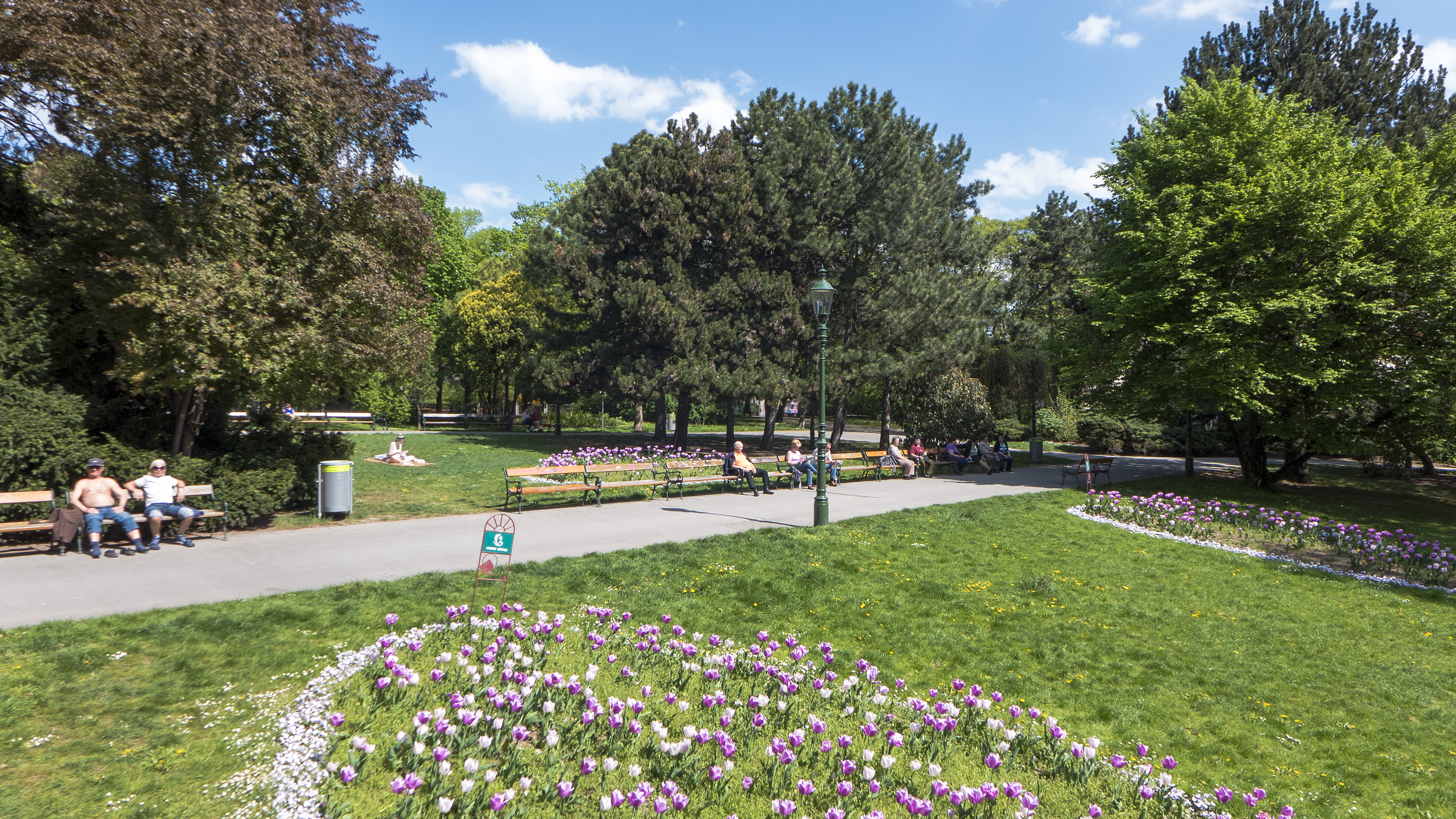 Waldmüllerpark in Wien 10